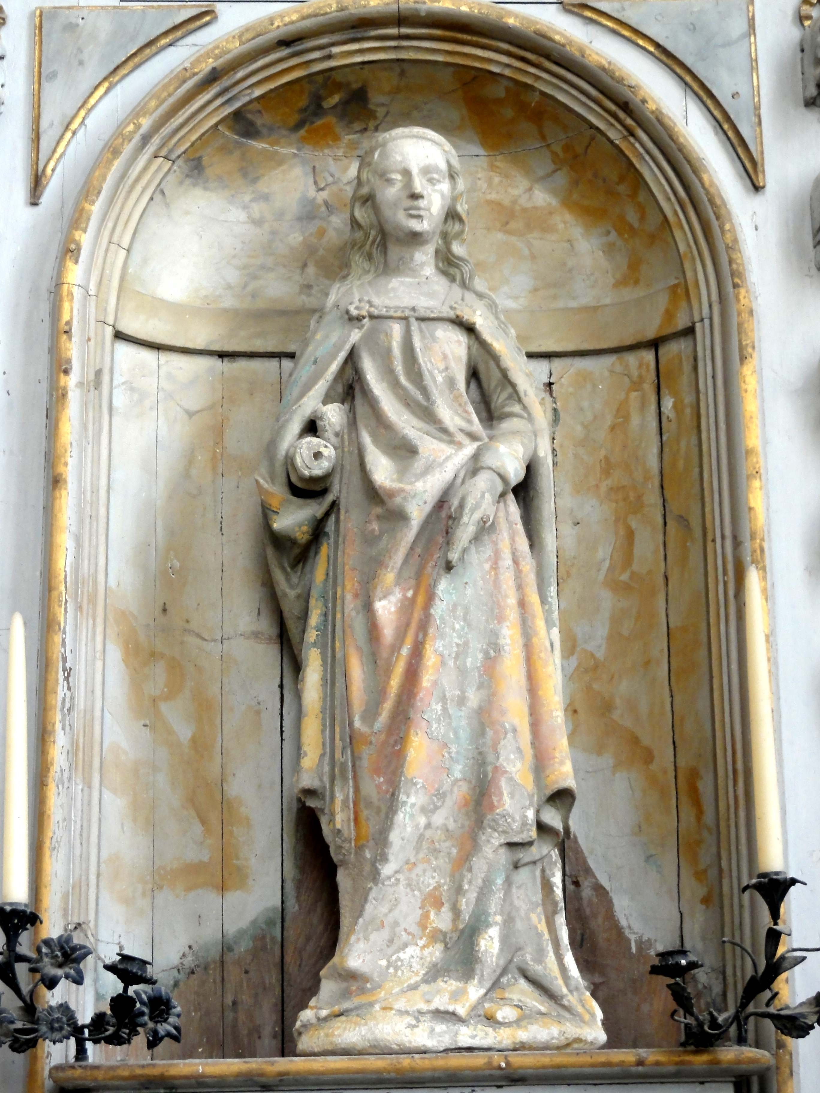 Mobilier de l'église (voir titre).